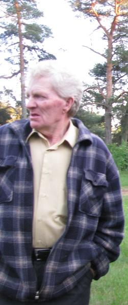 Piirissaare vallavanem Piirissaarel Tooni külas 2009. aastal